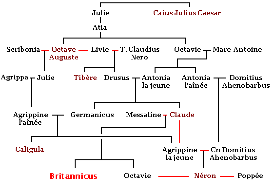 arbre généalogique des Julio-claudiens, les liens rouges représentent les mariages et les noms en bordeaux sont les Empereurs Julio-claudiens.